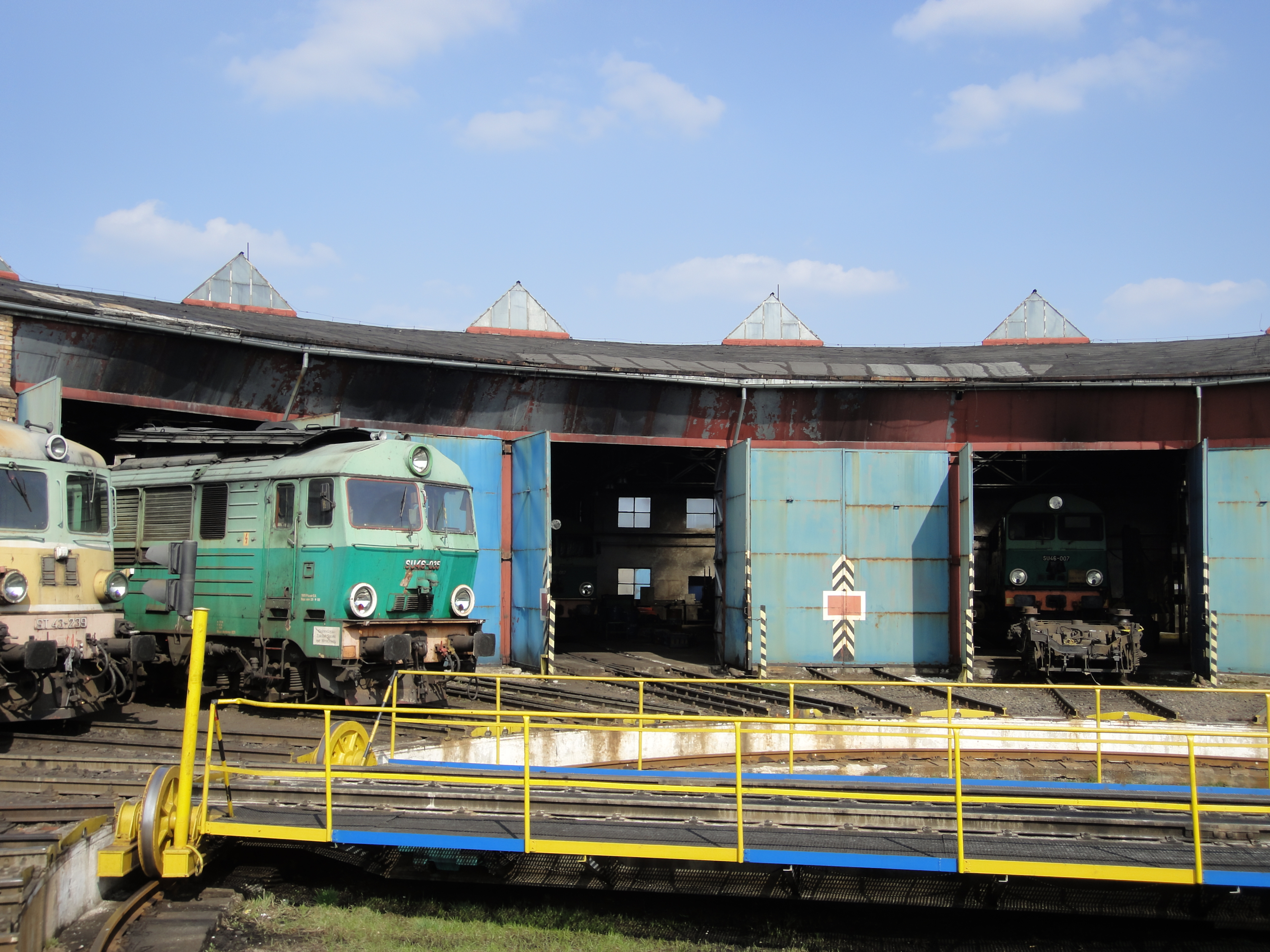 Lokomotywownia PKP Cargo i obrotnica w Węglińcu